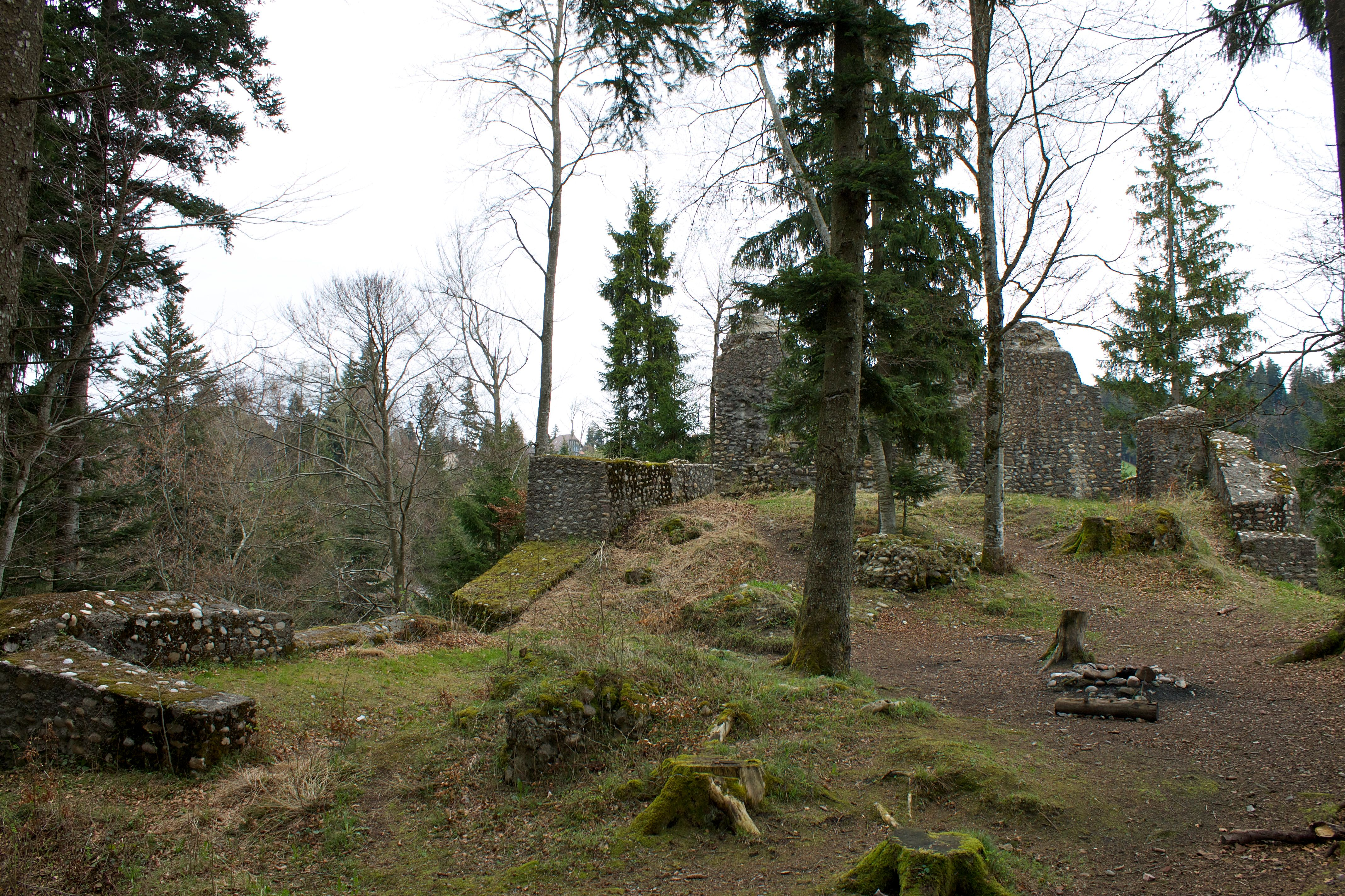 Ein Teil der Ruine Alt-Signau mit Umgebung